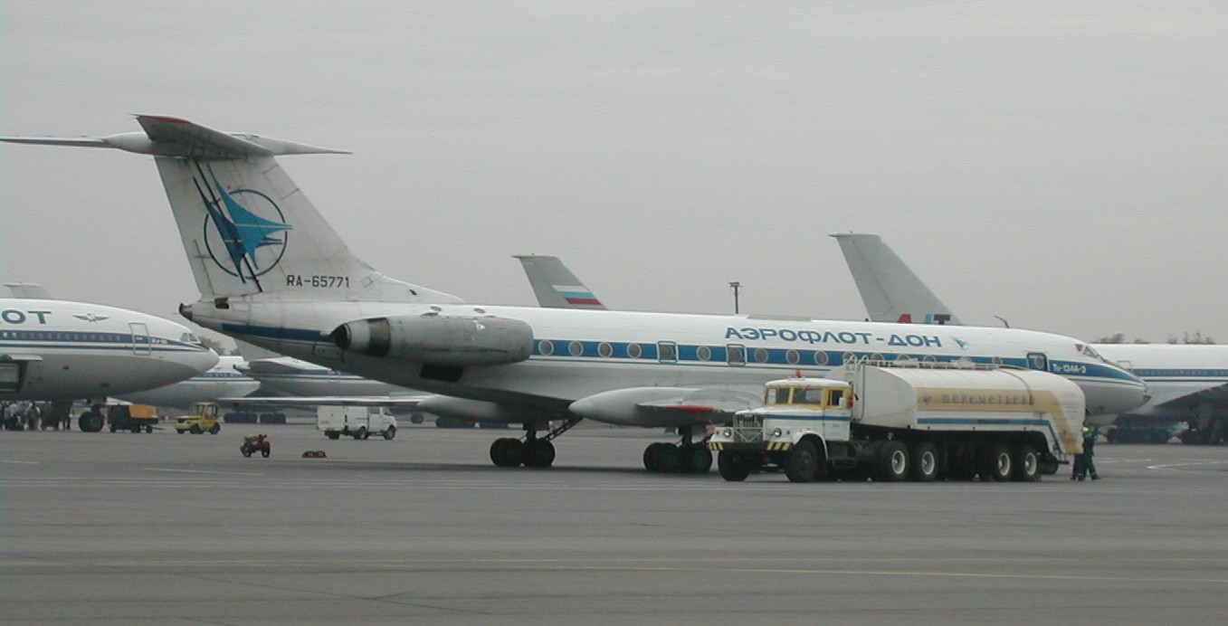 Samolot Tupolew Tu-134 w barwach rosyjskich linii lotnich Aerofłot-Don , Moskwa, Szeremietiewo-1, sierpień 2002 r.